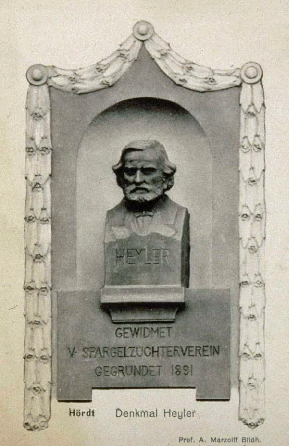 Denkmal Heyler, Hœrdt (A. Marzolff). 1880. Bibliothèque nationale et universitaire de Strasbourg.